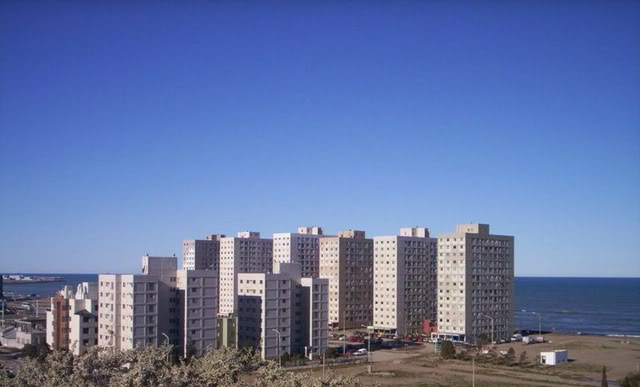 torres en Cr